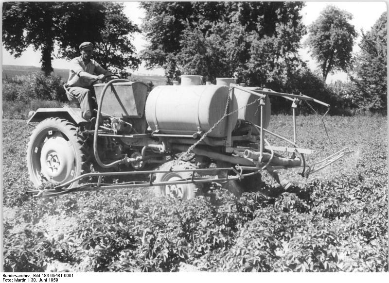 Kittendorf, Traktorist beim Spritzen Zentralbild Martin 30.6.1959 Schädlingsbekämpfung im VEG Kittendorf, Kreis Malchin. Mit Cupral gegen Kartoffelfäulnis und Gesaktiv gegen Kartoffelkäfer gehen die Kollegen des Volksgutes Kittendorf auf ihren Kartoffelfeldern vor. Zwei kg Cupral und 1 kg Gesaktiv werden je ha benötigt. Mit dem RS 09-15 mit Spritz- und Stäubegerät der MTS Zettemin werden 17 - 20 ha in der Stunde geschafft. UBz: Traktorist Wilhelm Voß von der MTS Zettemin auf dem 45 ha-Schlag des Volksgutes.